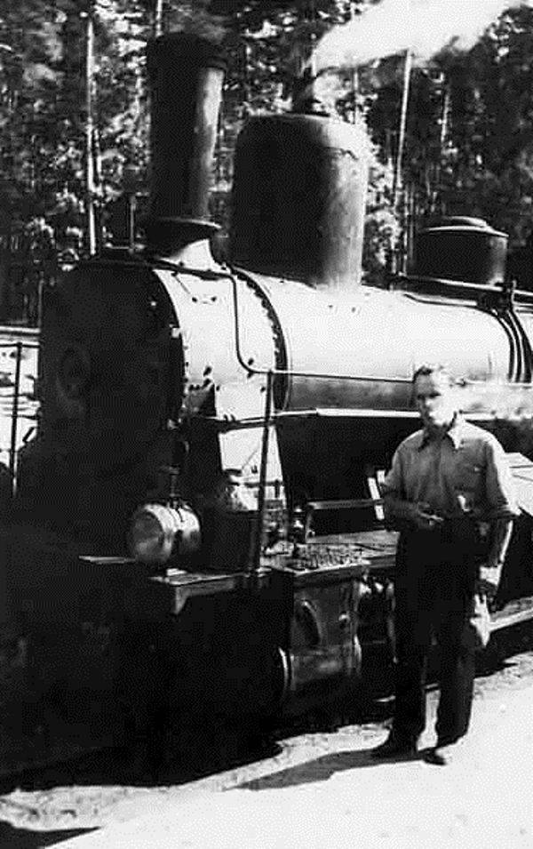 К.Г. Паустовский в Солотче на узкоколейке Рязань - Тума. Конец 1930-х годов